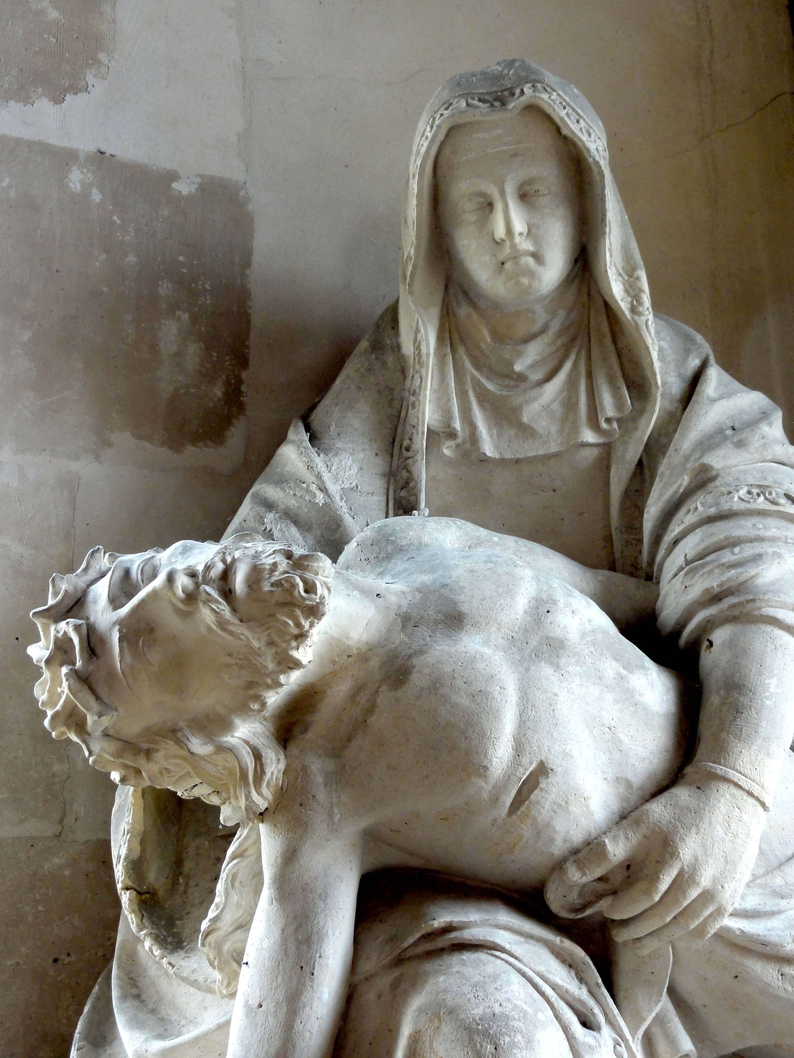 Pietà du second quart du XVIe siècle.